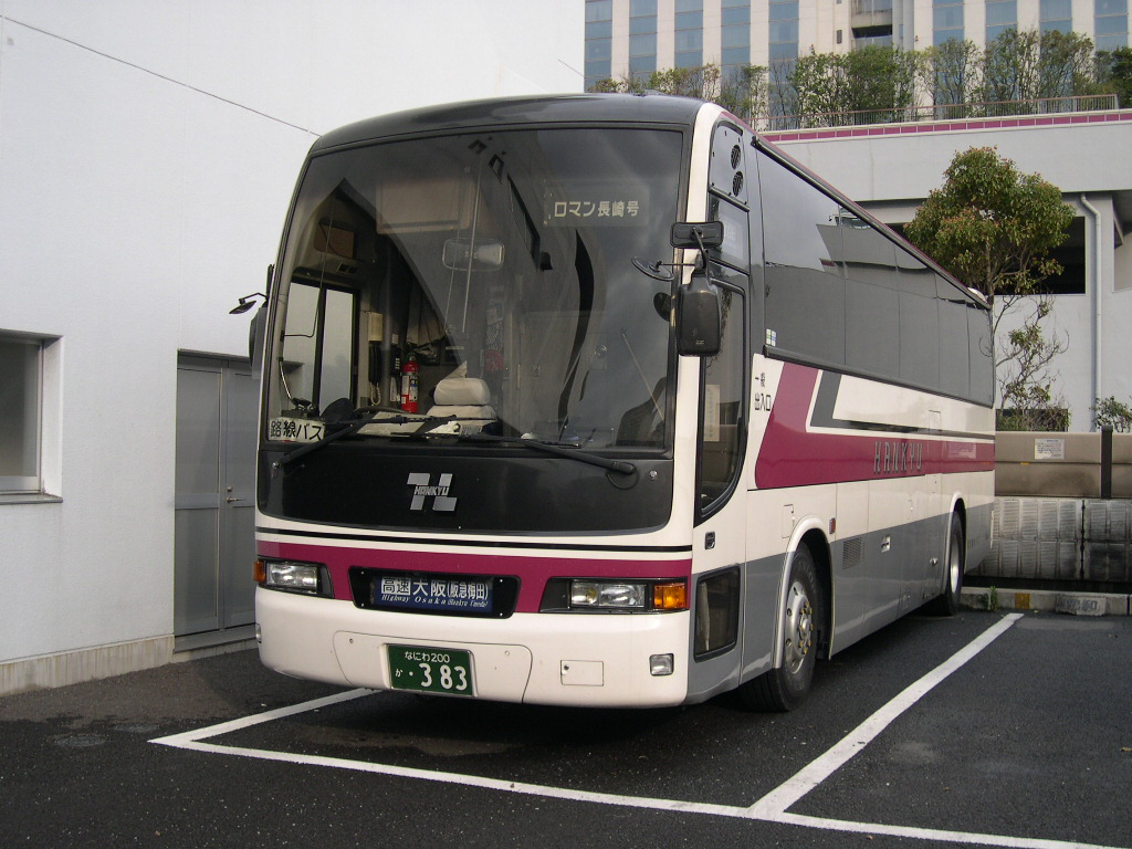 長崎県交通局営業所にて、許可を得て撮影